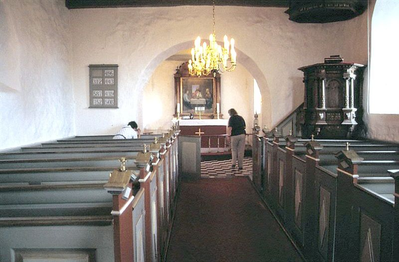 Helstrup Kirke, kirkerummet set mod øst; Randers Kommune, Denmark